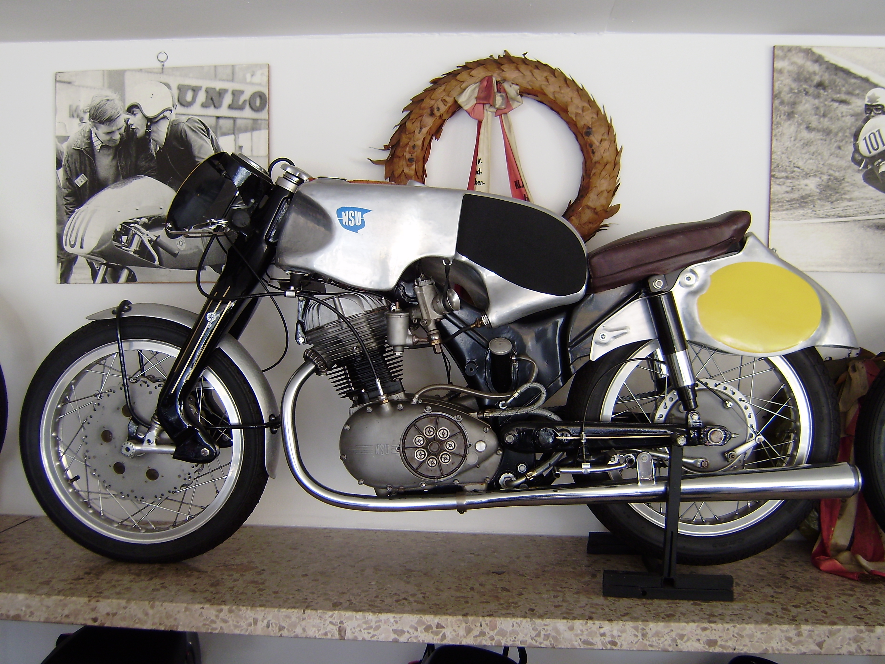 Toni Grubers Rennmotorrad NSU Max 250 ccm, ausgestellt im Rennsportmuseum des Autohauses Gruber in Weiler im Allgäu